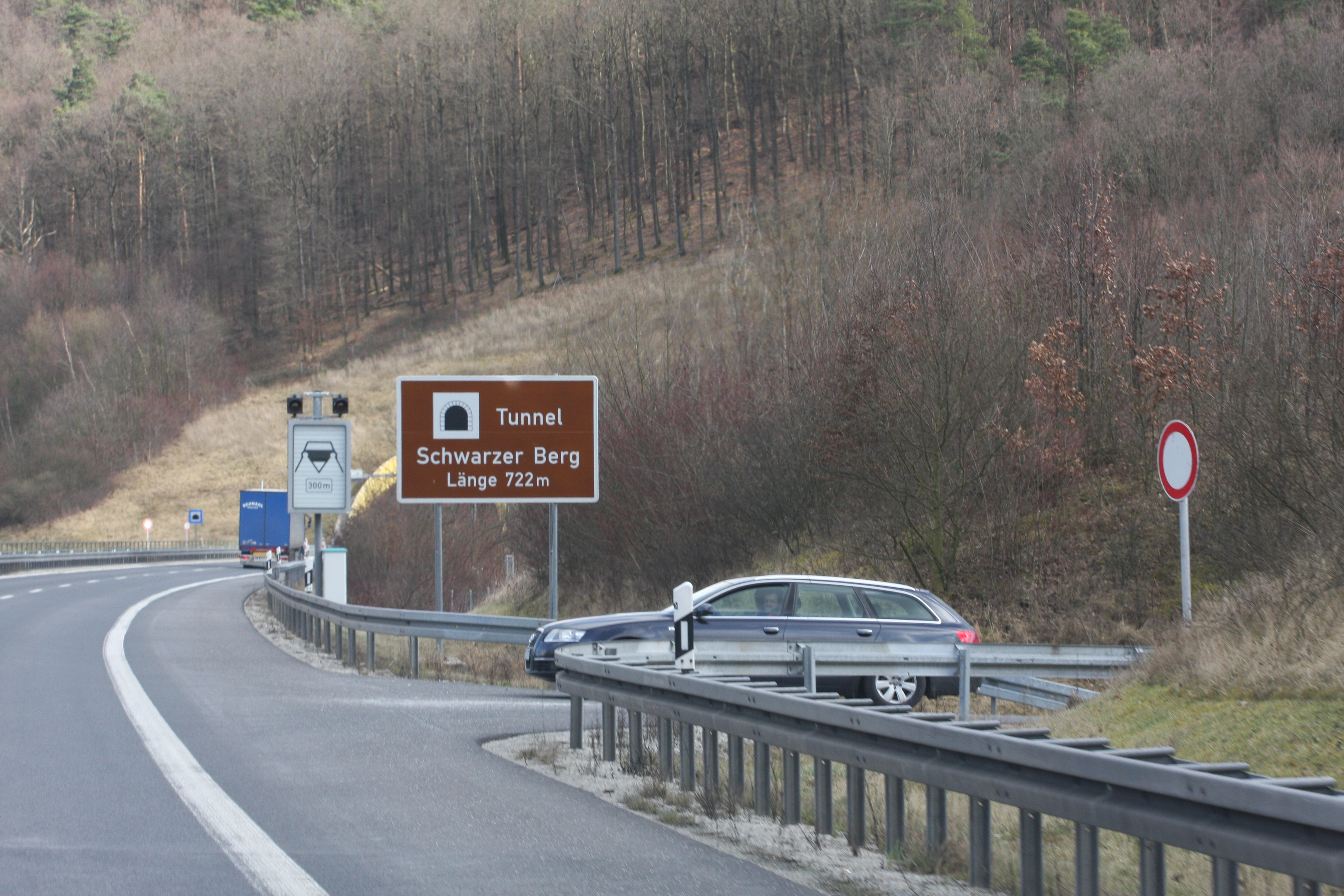 Ingang Schwarzerberg tunnel